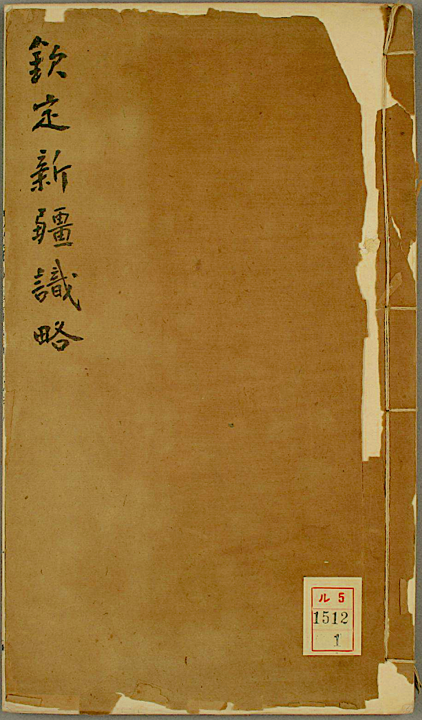 《钦定新疆识略》武英殿版封面